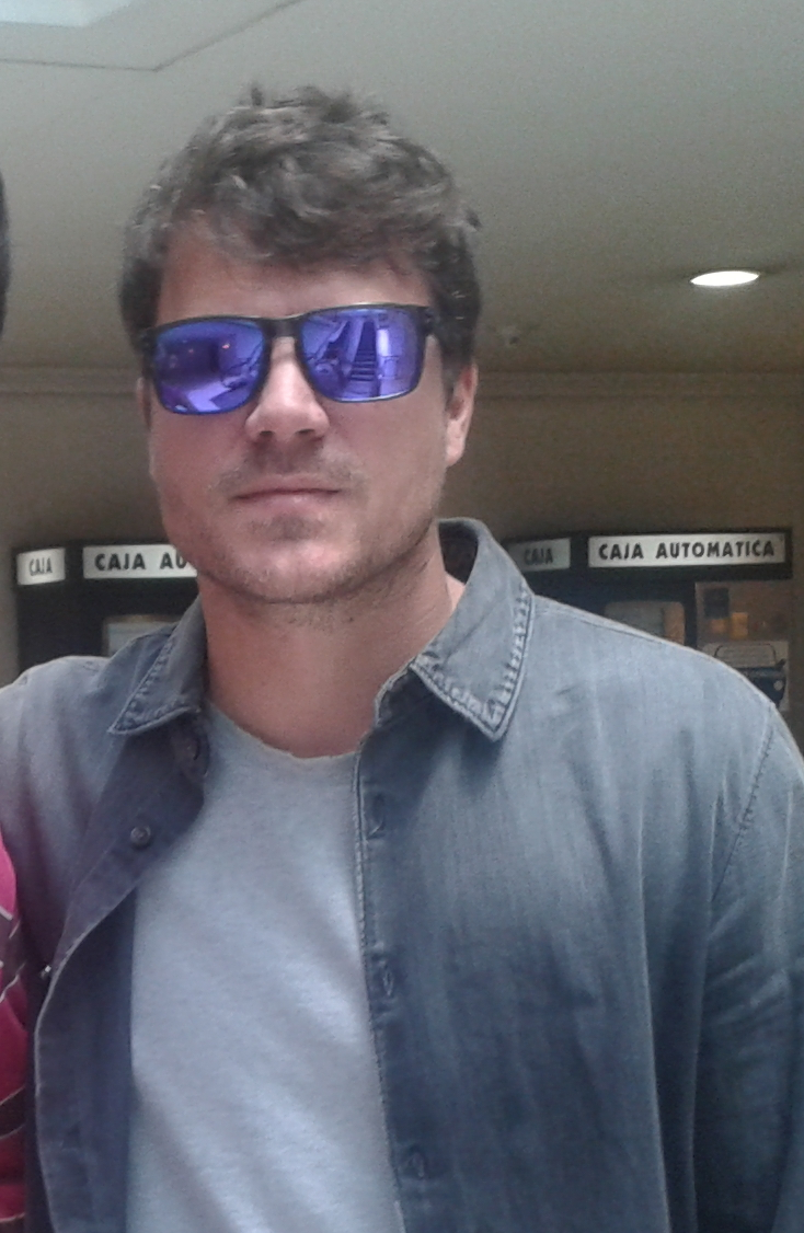 Dani Martín en junio de 2013.